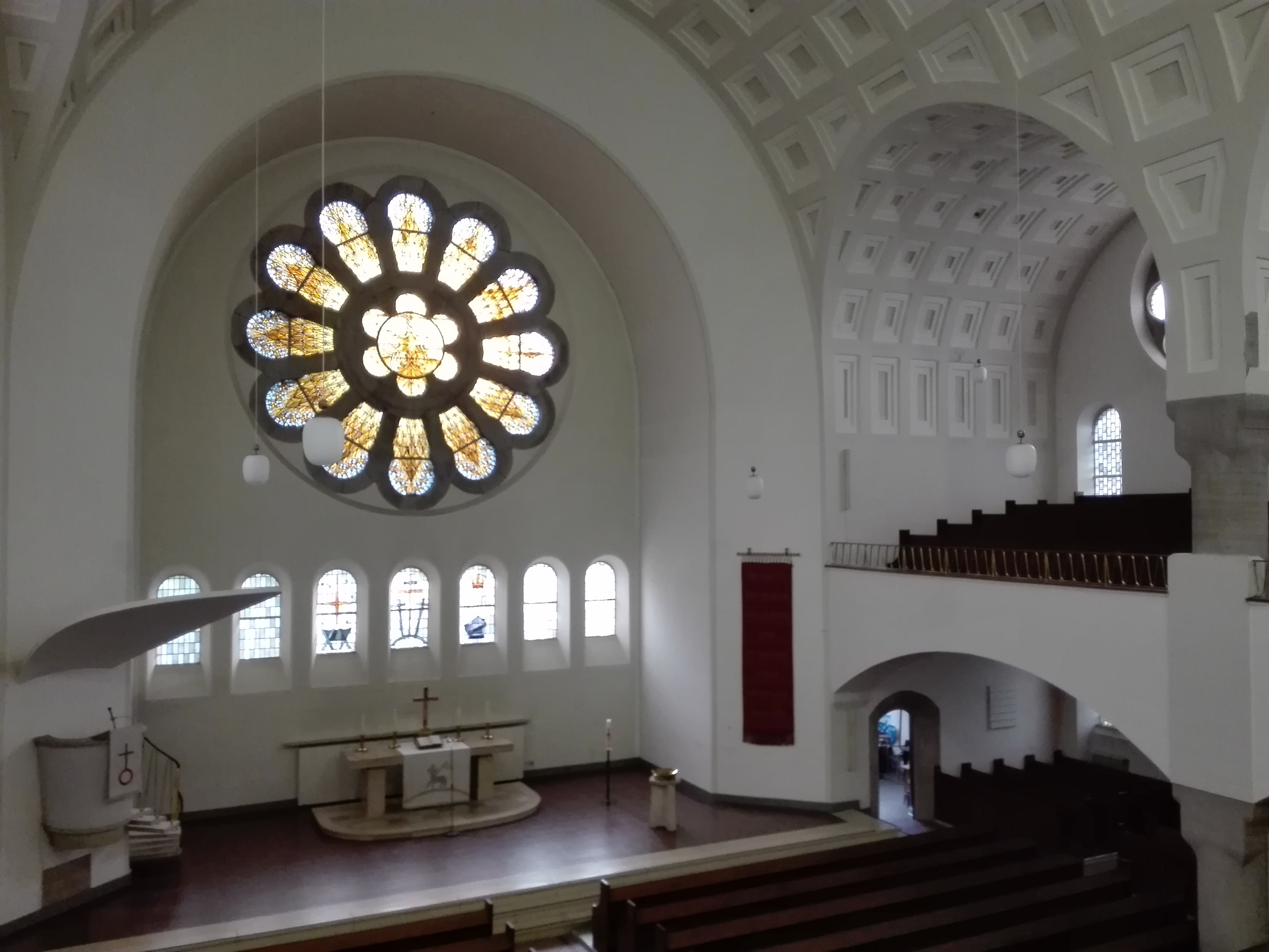 Lutherkirche Wuppertal-Barmen, 106. Emporenkonzert am 20. Mai 2017